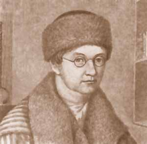 Aleksandr Fjodorovitch Voeikov (177?-1839), Russian poet and translator.